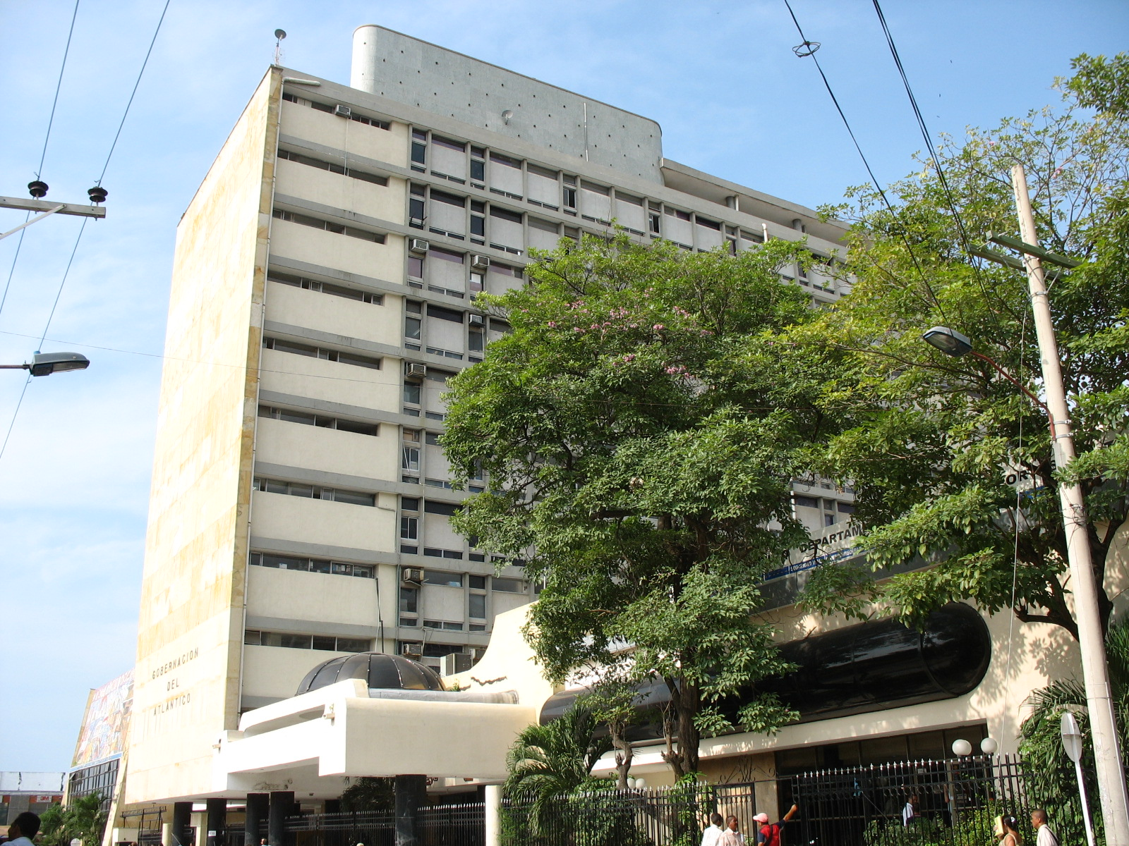 Gobernación del departamento del Atlántico, Colombia